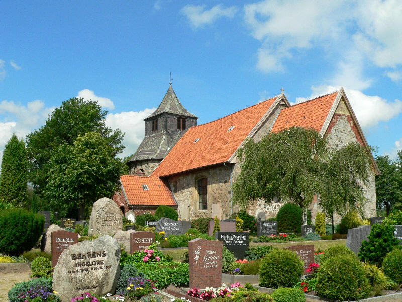 Bildbeschreibung